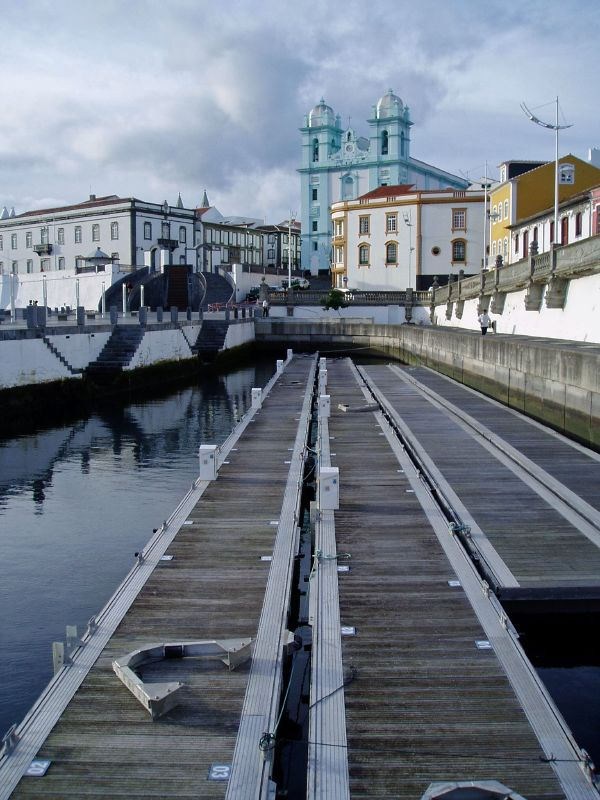 Baía